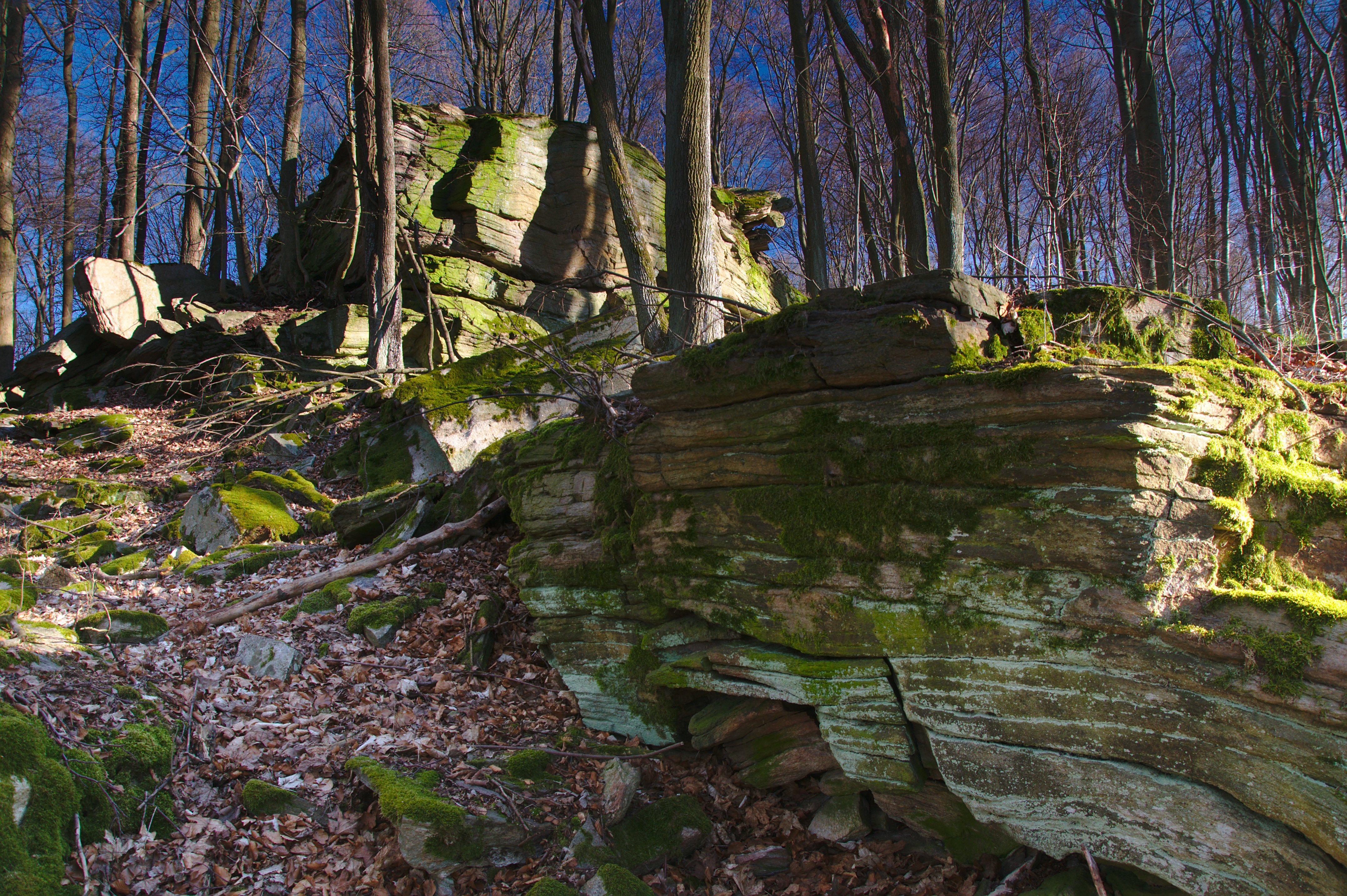 Přírodní rezervace Hrádky, okres Blansko